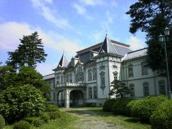 Yamagata-UNIV,Yonezawa Campus. An important cultural Property of Japan.山形大学米沢キャンパス。元、米沢工業高等学校。重要文化財指定建造物。携帯で撮影したのが悔やまれます。